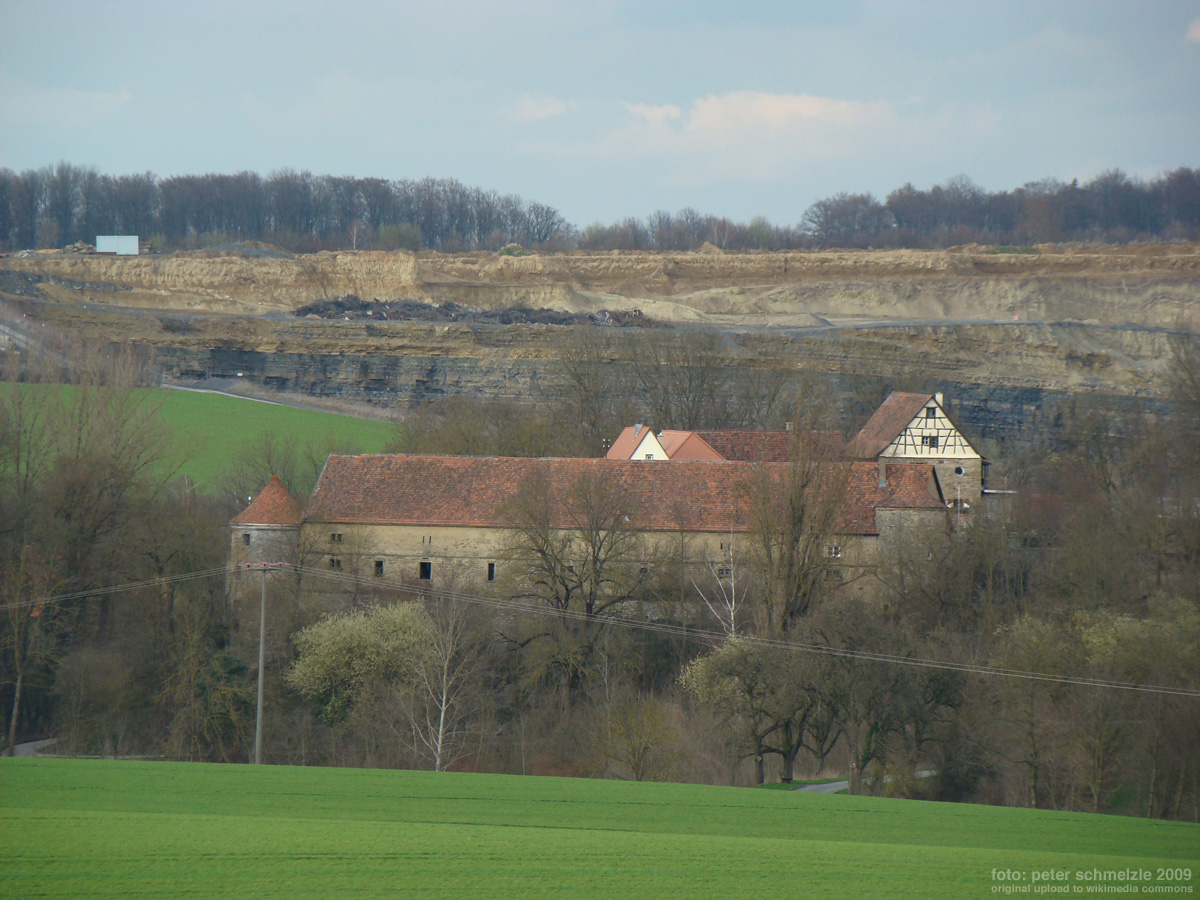 Burg Streichenberg bei Stebbach, im Hintergrund der Gemminger Steinbruch